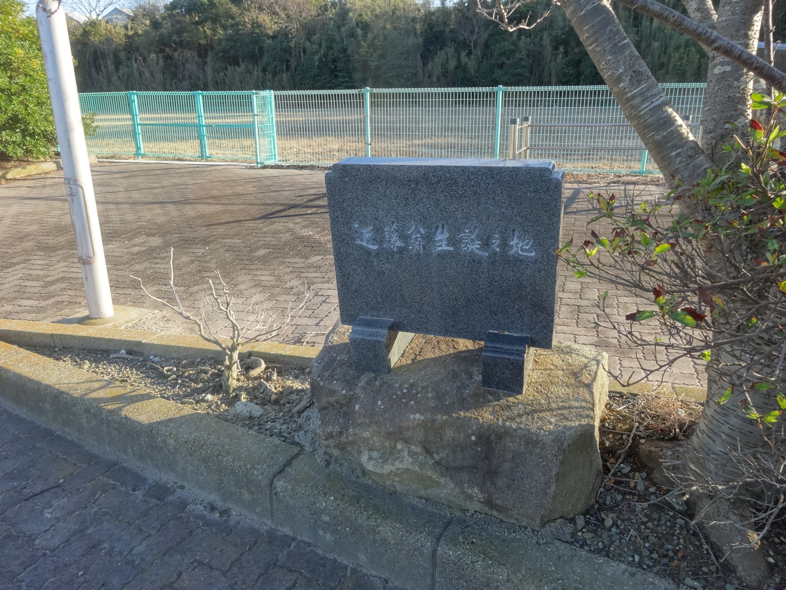 豊橋市を中心に活躍した政治家・近藤寿市郎の生誕の地の碑。田原市高松町京塚の高松東部農村広場にある。